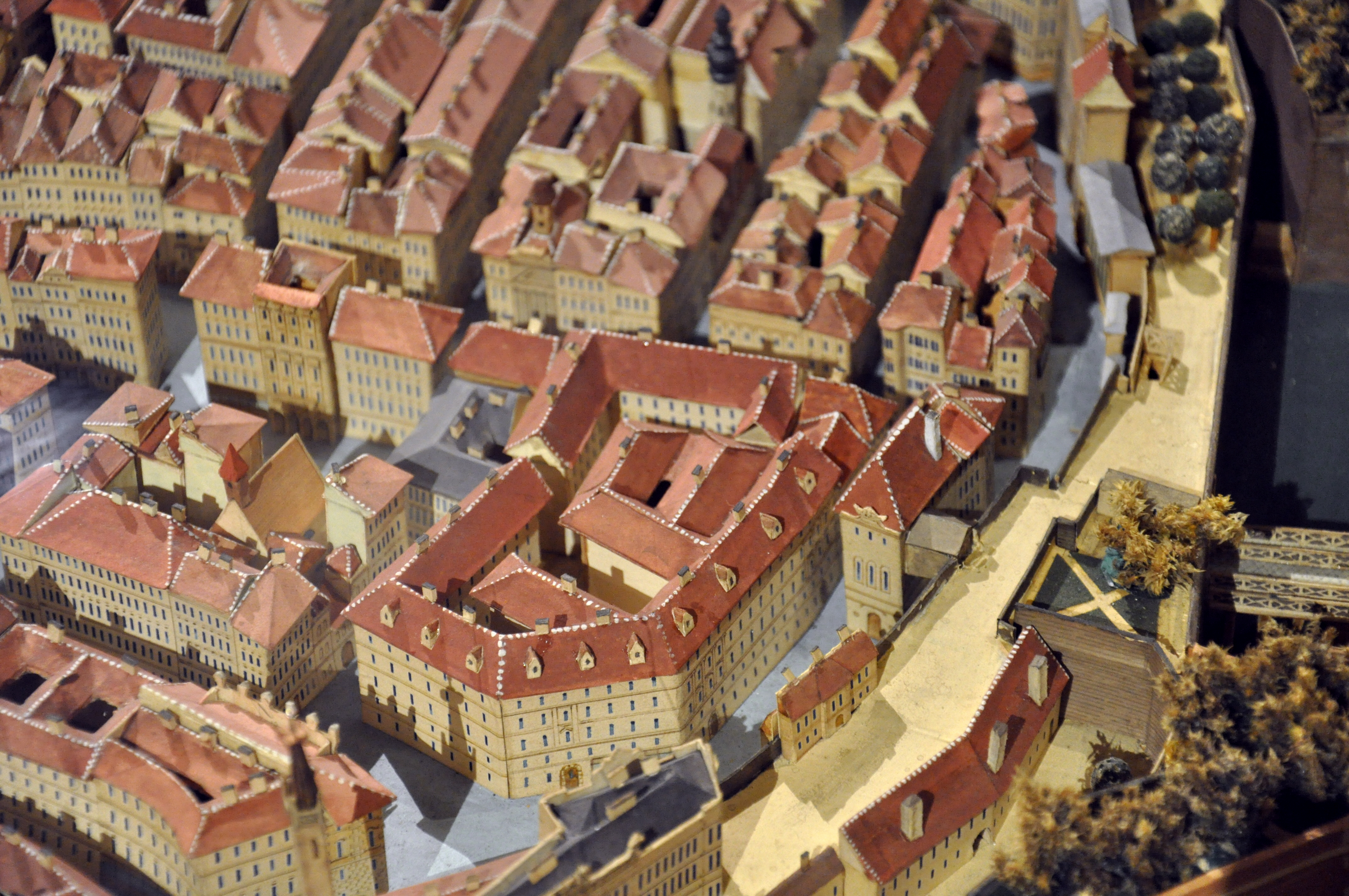 Modell der Stadt Wien um 1845, ausgestellt in der Sammlung Alter Musikinstrumente (des Kunsthistorischen Museums) in der Neuen Burg. Leihgabe von Helmut Czakler, Wien. Kärntnertor mit Theater am Kärntnertor und Umgebung. An Stelle der Gebäude im Vordergrund entstand später die Wiener Staatsoper. Ganz vorne sieht man noch die heutige Albertina.